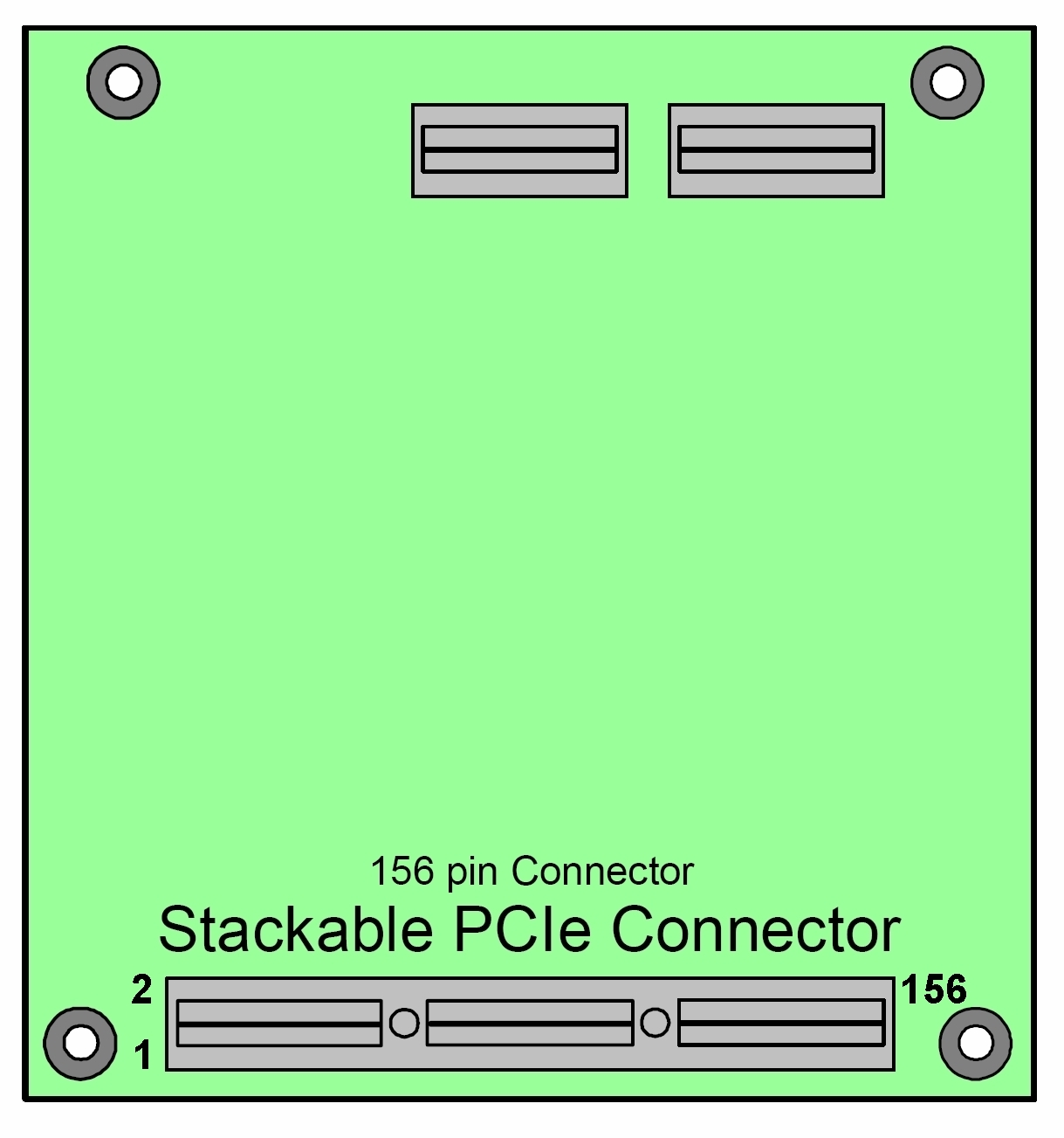 Адаптерный модуль для PCIe/104 (патент Украины на полезную модель №38252)